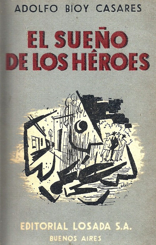 Primera edición de la novela "El sueño de los héroes" (1954) del escritor argentino Adolfo Bioy Casares.